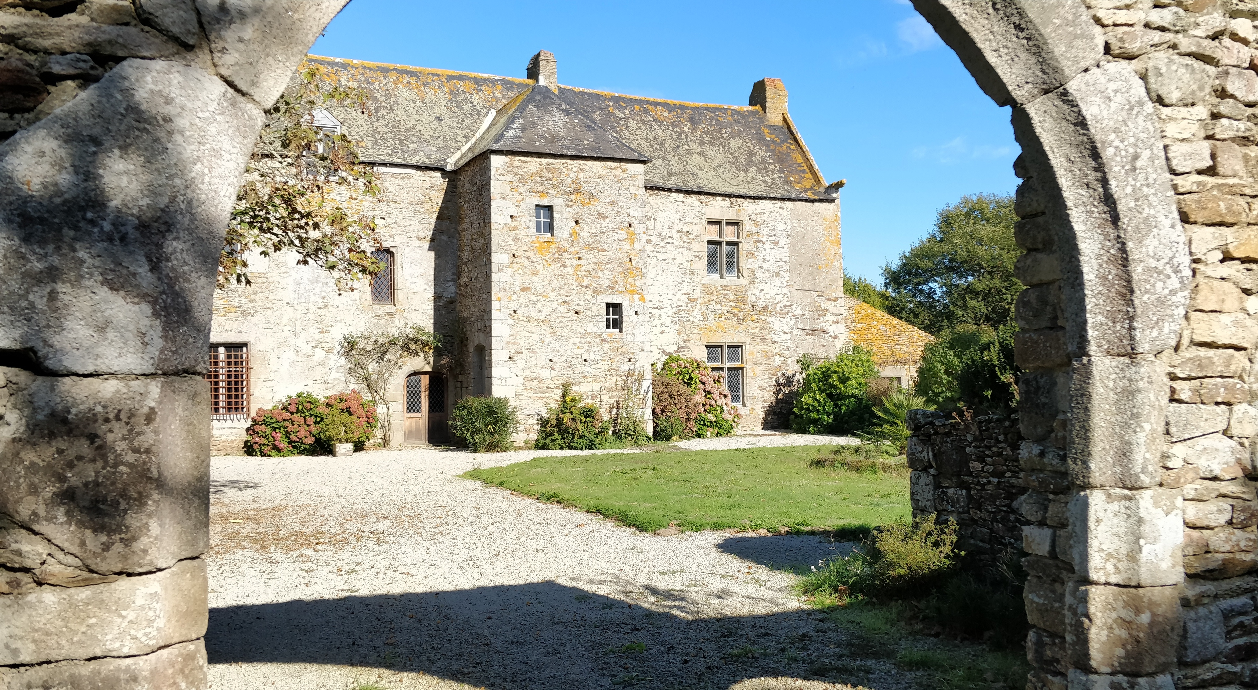 Façade sud du manoir